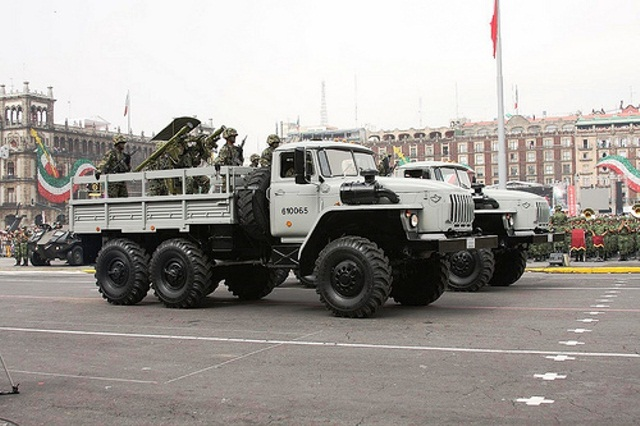 Ural 4320-31 perteneciente a la Marina Armada de Mexico